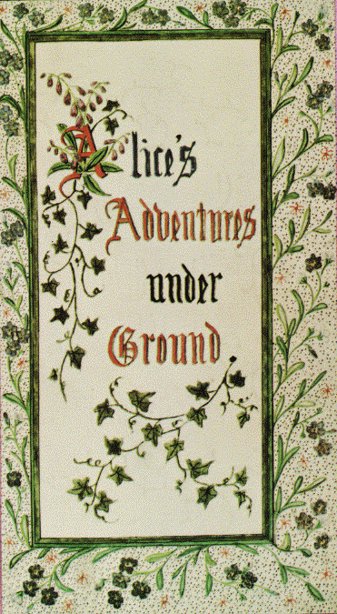 Alice's Adventures Under Ground Originalcover der handschriftlichen Urfassung